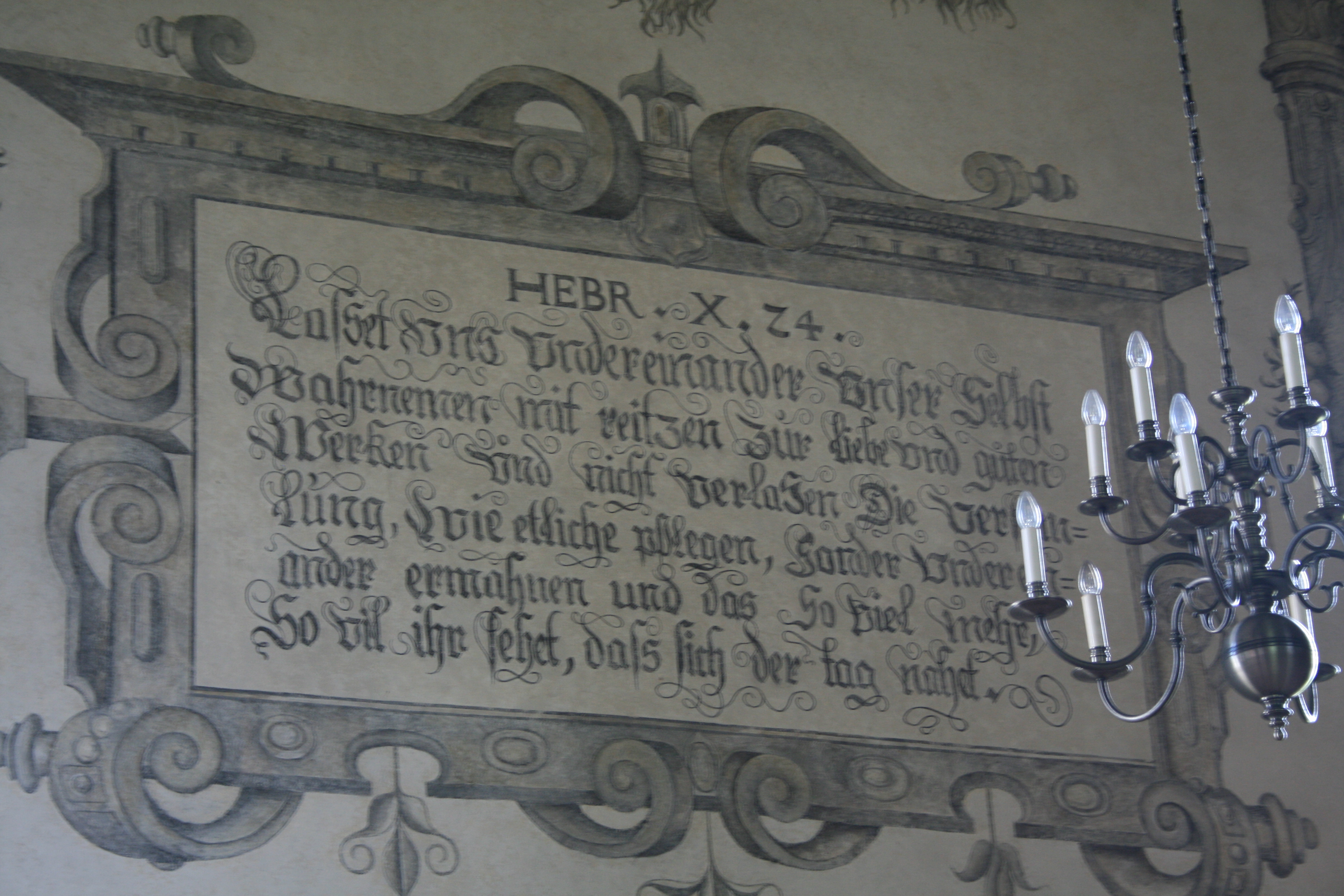 Vers aus Hebräer 10 in der ref. Kirche Gränichen